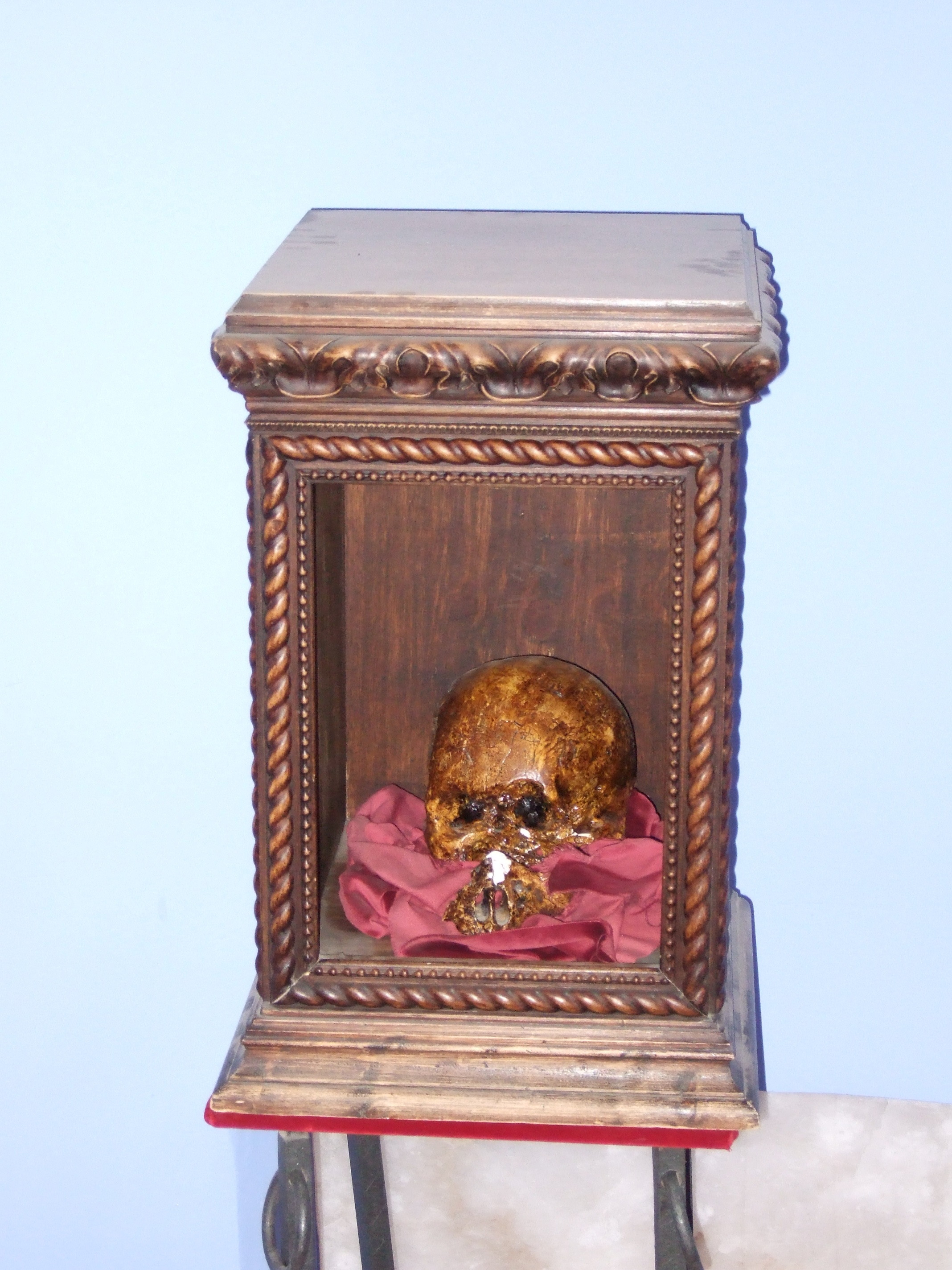 Illueca - Palacio del Papa Luna